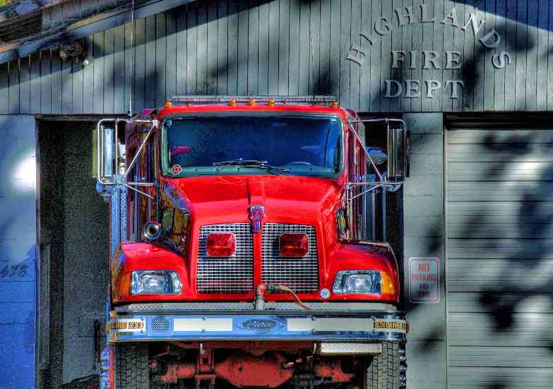 Mountainaire AZ Fire Dept.